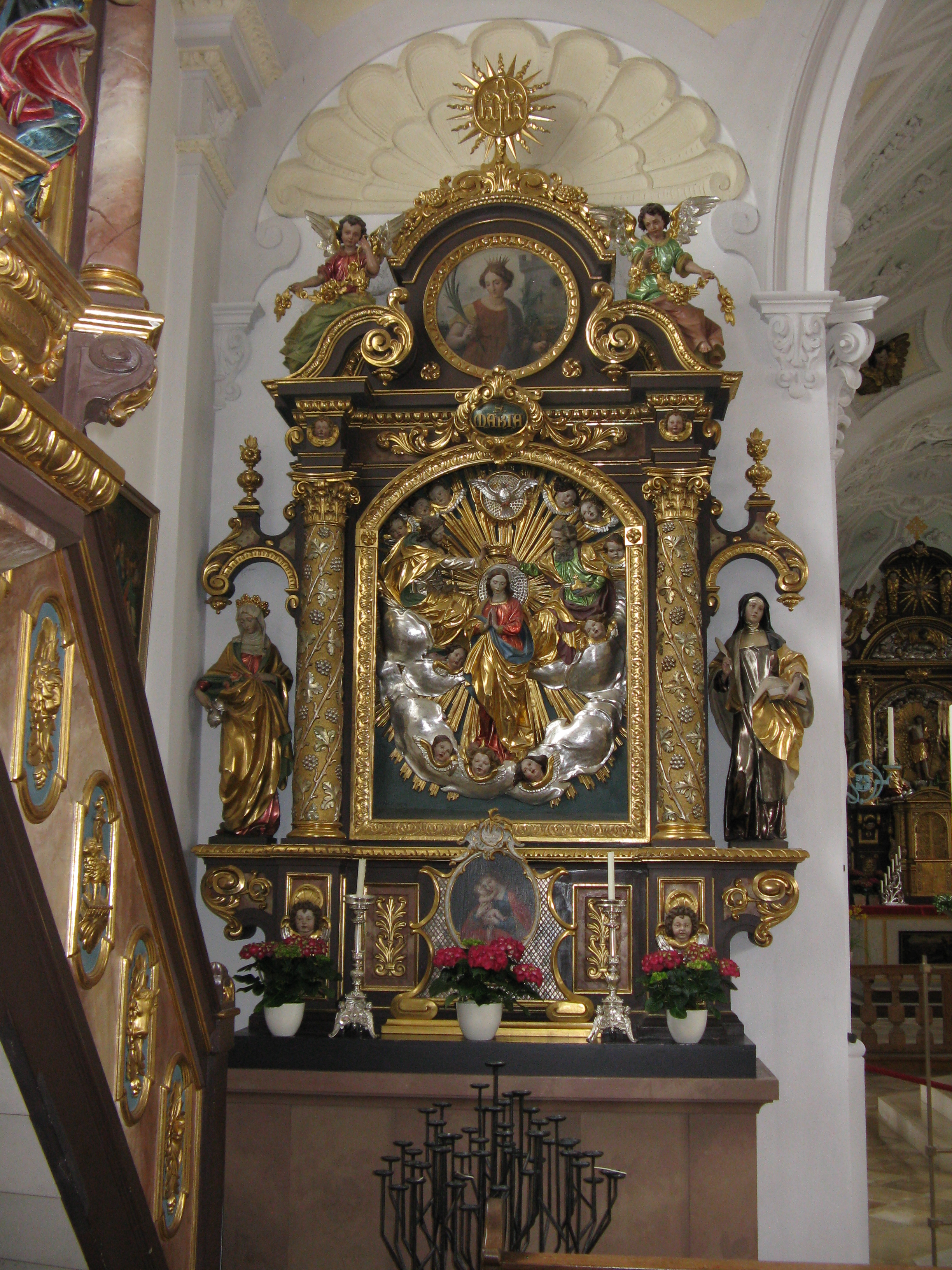 St. Michael, Seeshaupt, linker Seitenaltar, sog. Frauenaltar, Krönung Mariens